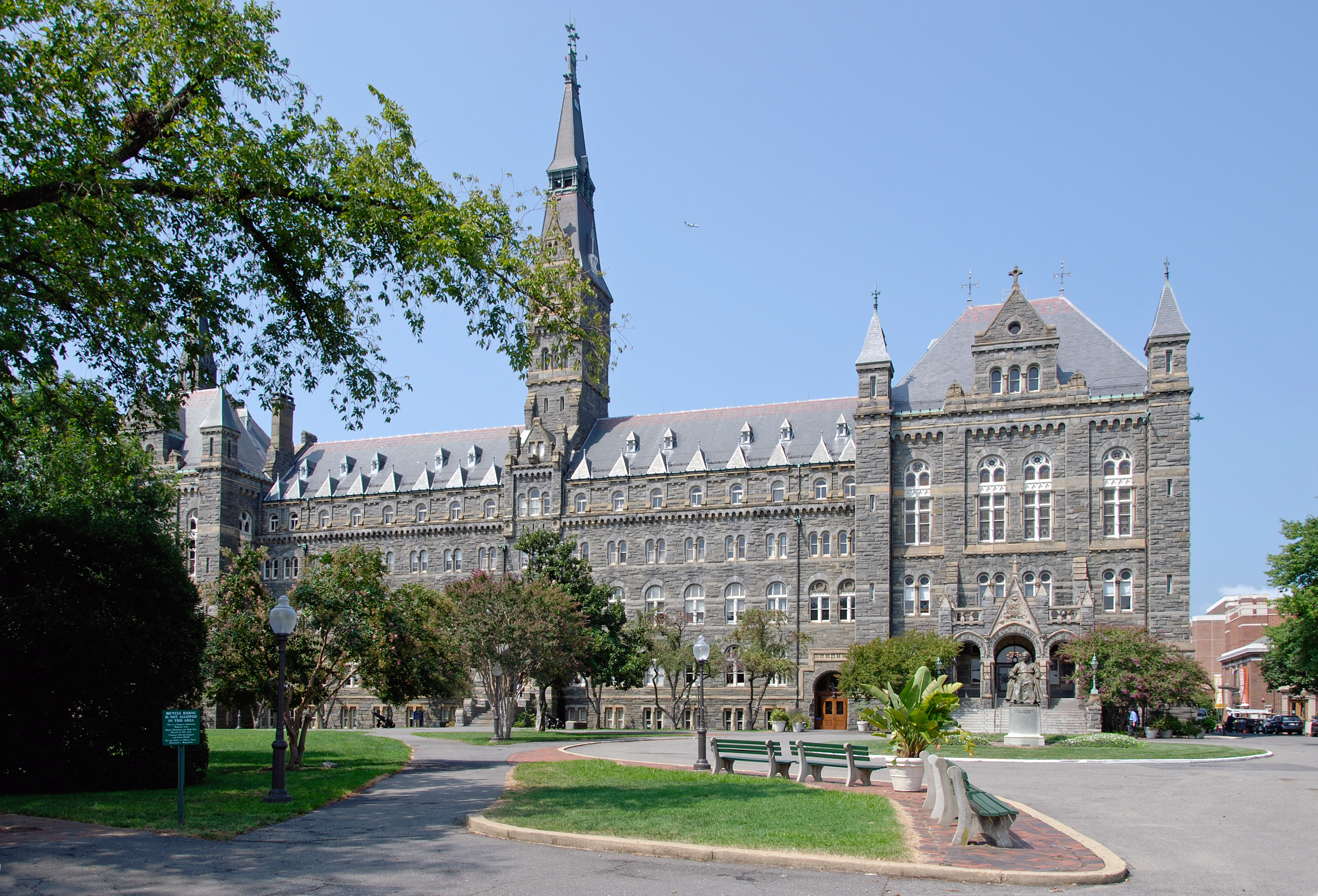 Entrata principale della Georgetown University